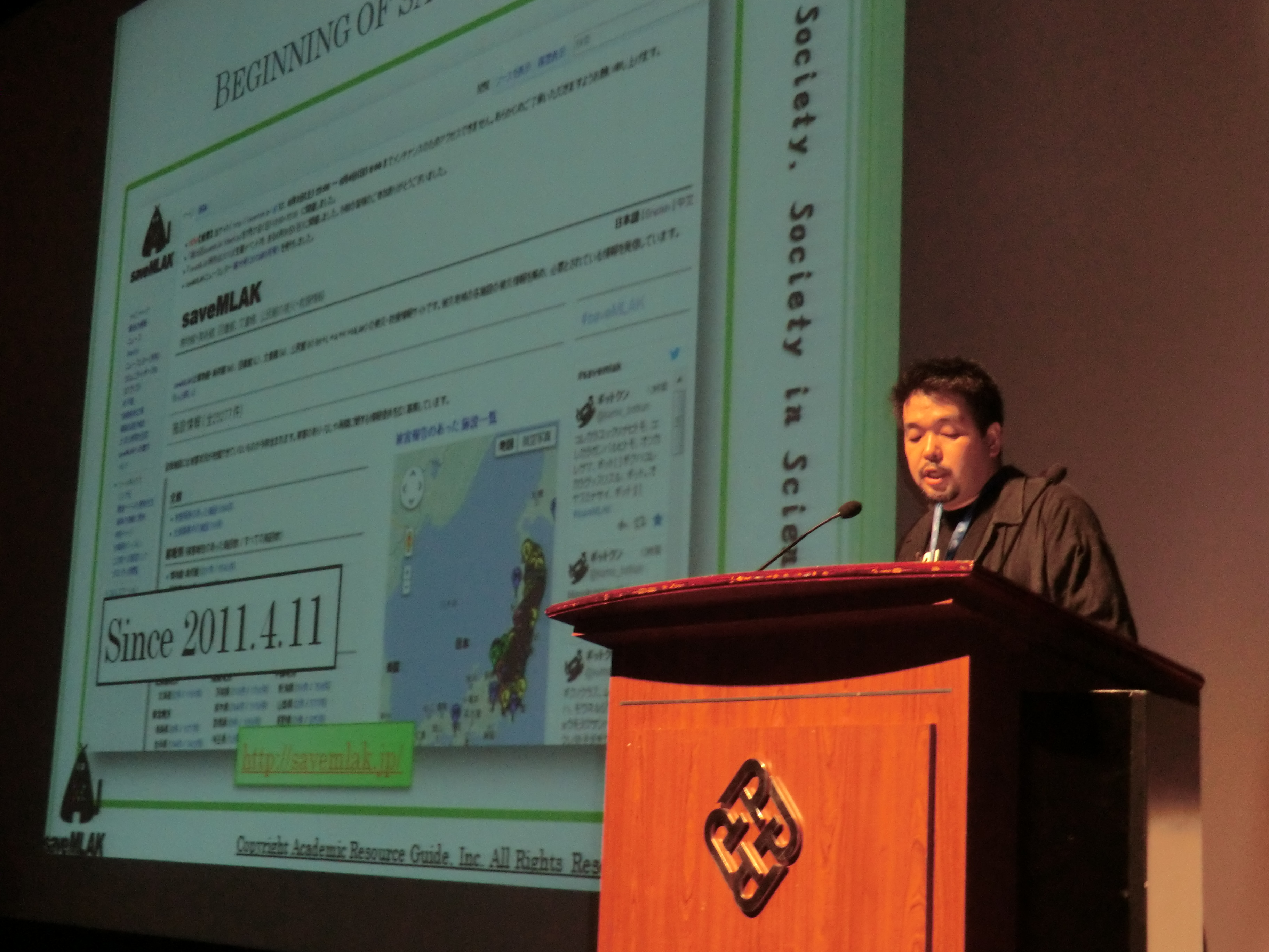 Wikimania2013におけるオープニング講演（岡本真）